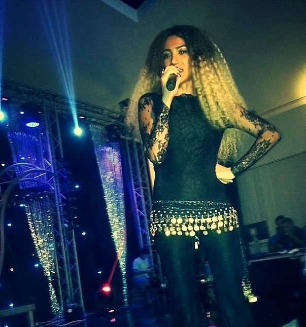 Röya Ayxan Qabala konsert 10.08.2013